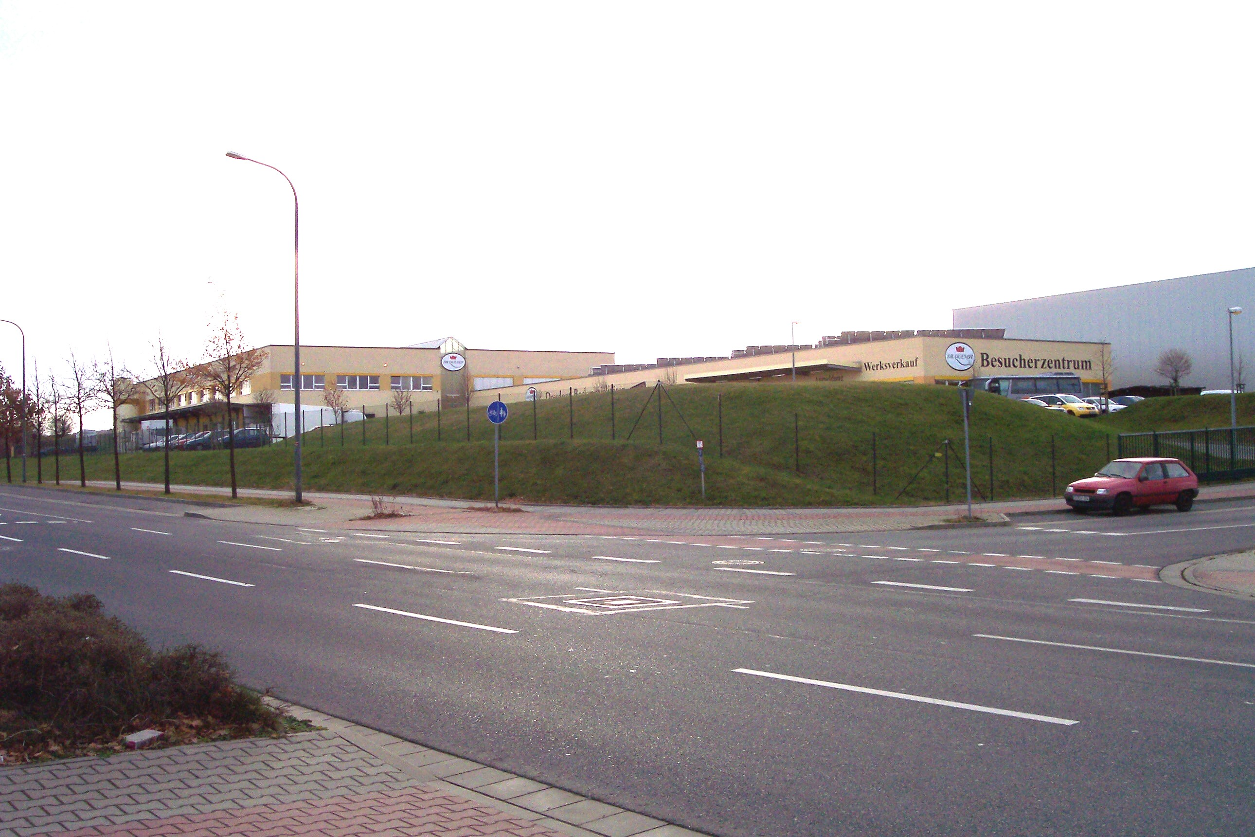 Werk des Unternehmens Backspezialitäten Dr. Quendt im Gewerbegebiet Coschütz-Gittersee